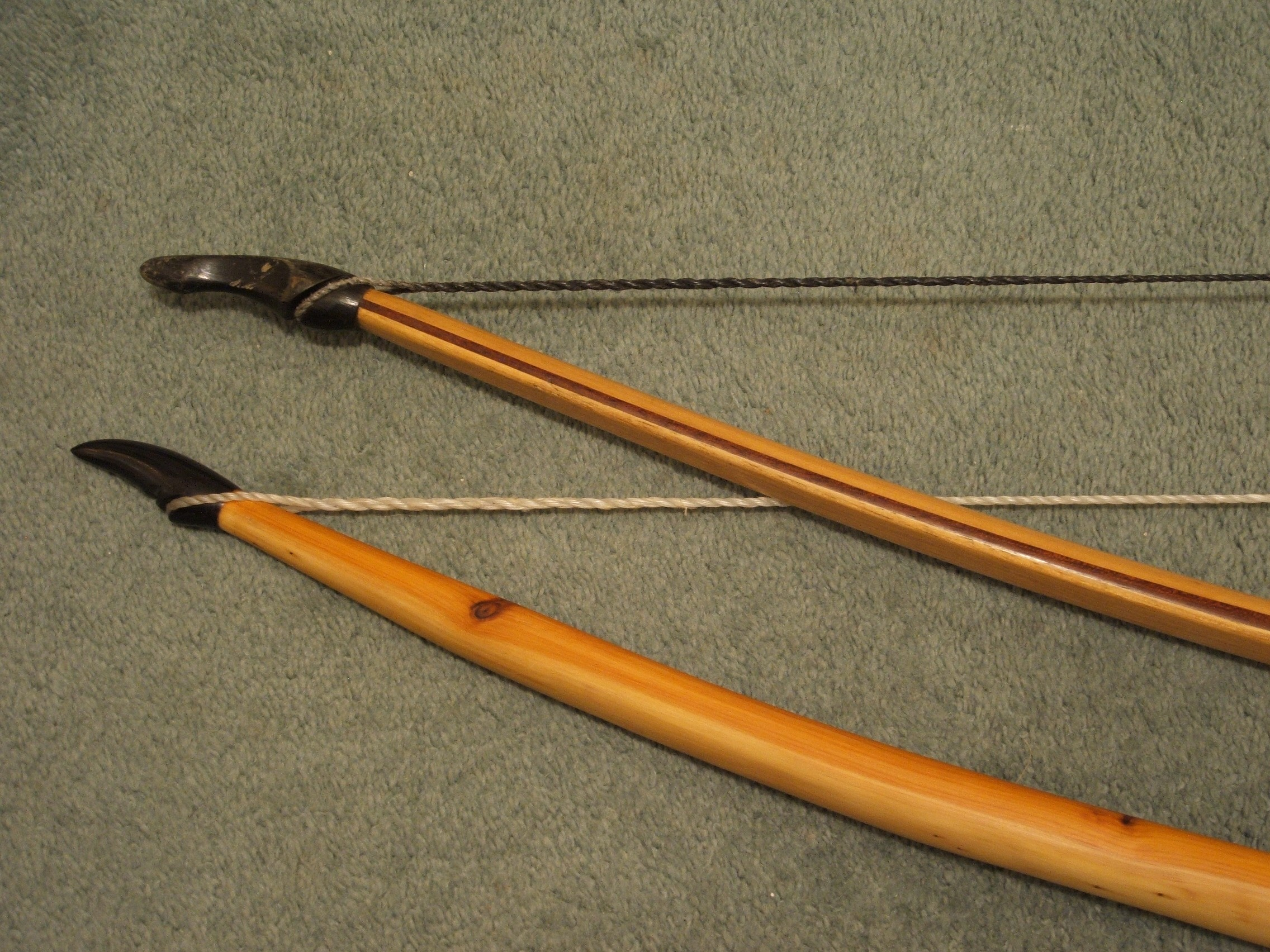 extremités de longbow